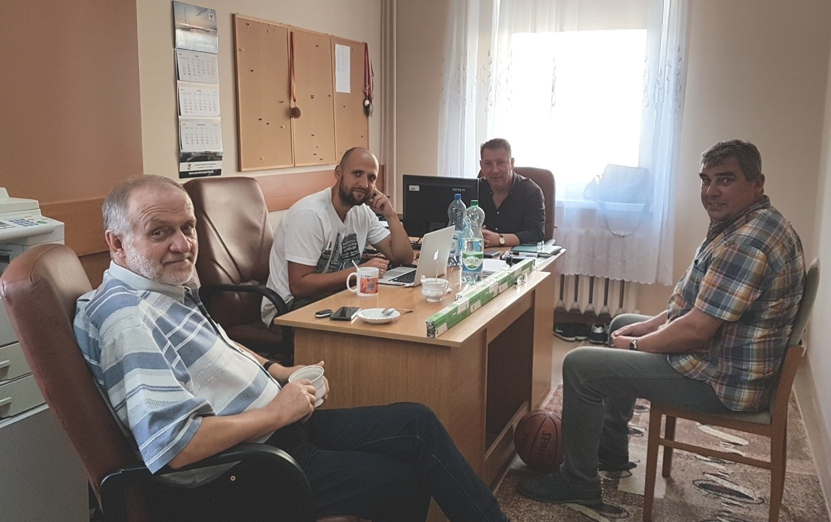 Robocze spotkania sztabu trenerskiego działaczy Spójni